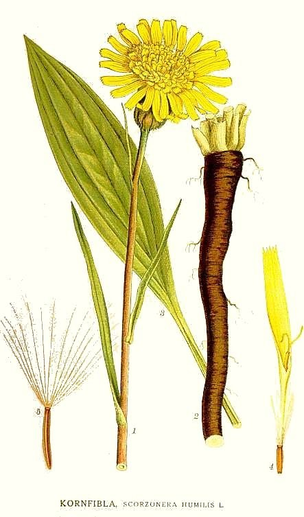 Original Description Kornfibla, Scorzonera humilis L.